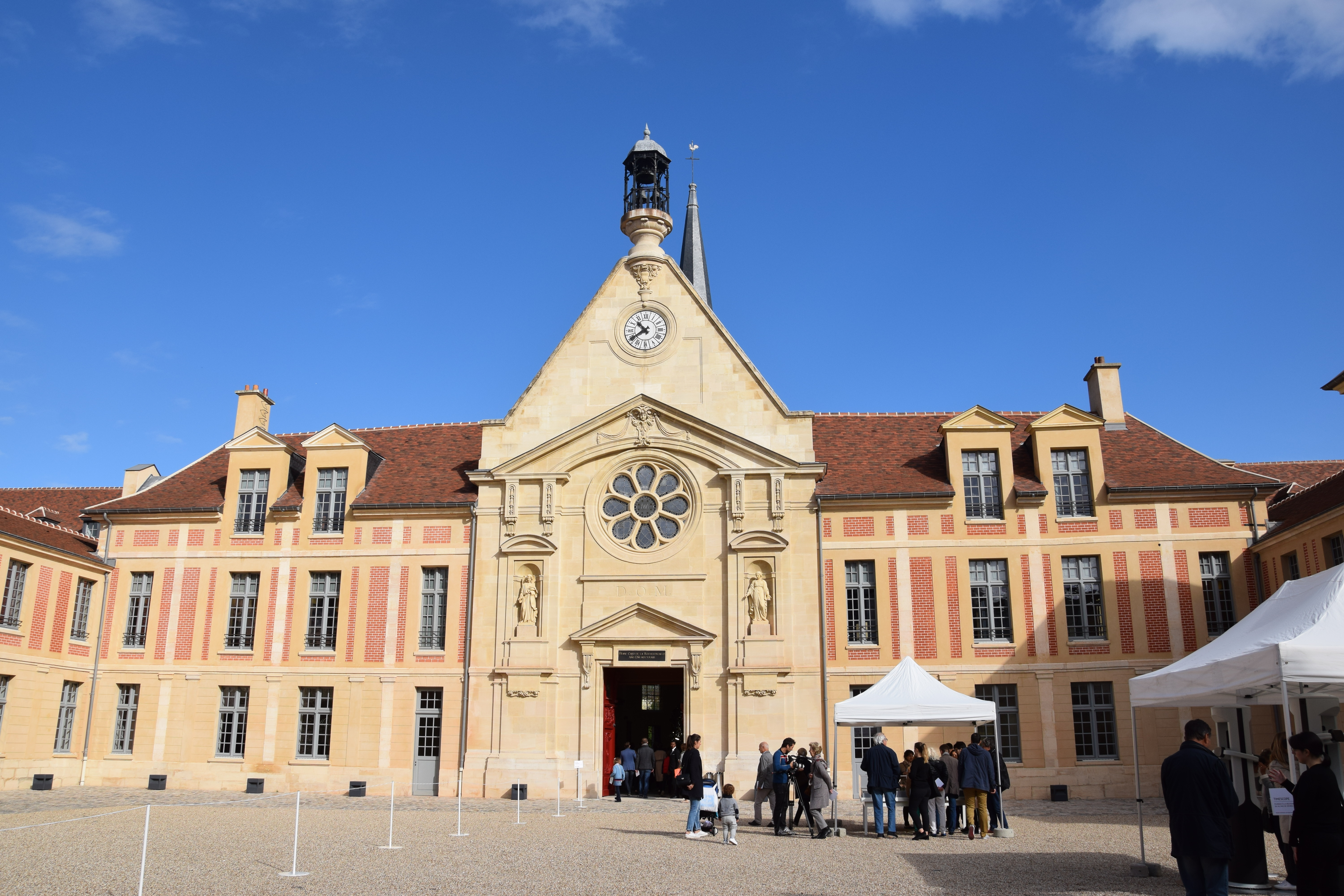 Hôpital Laennec de Paris